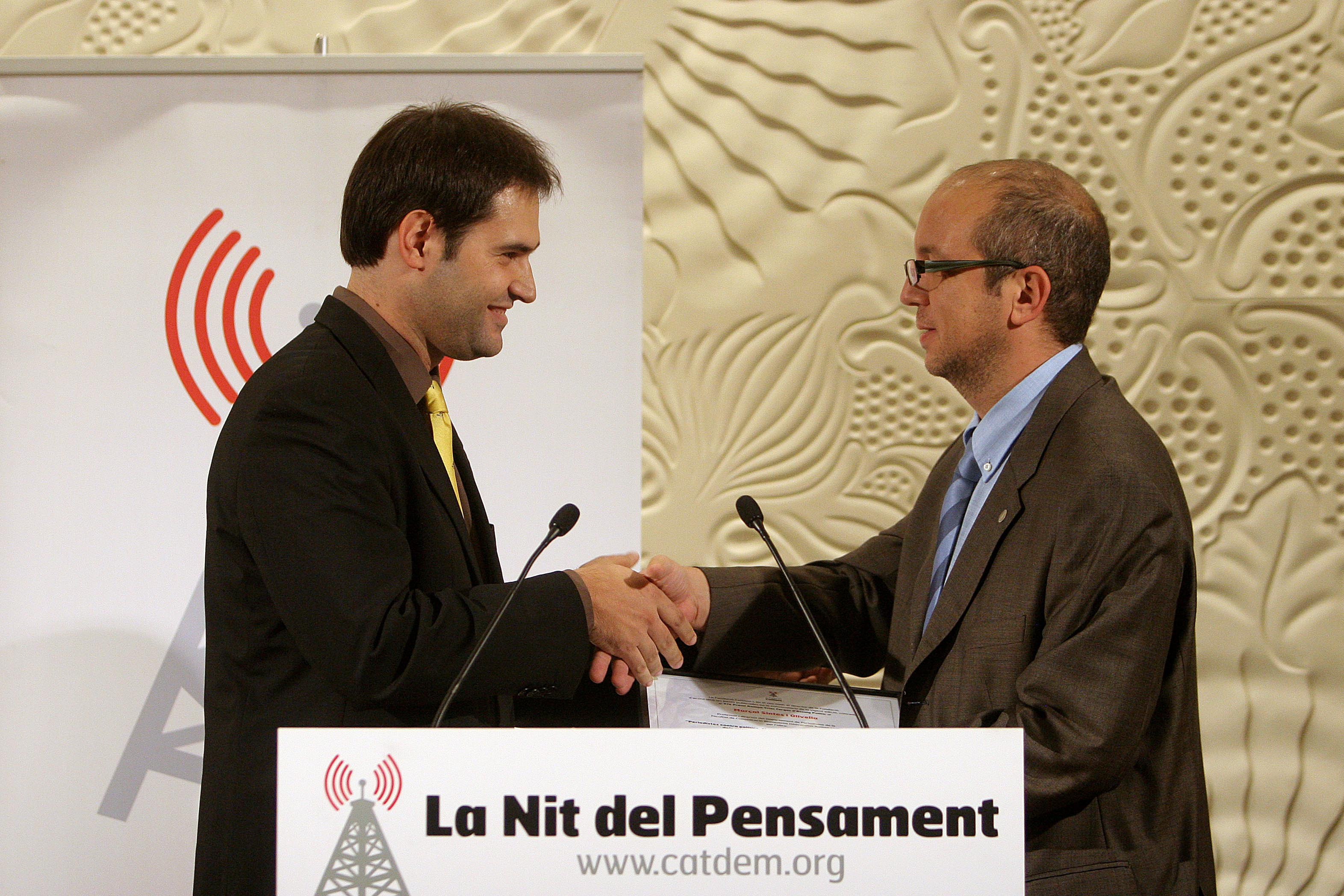 101013mp premi trias fargas d' assaig politic 2010 dins la nit del pensament que organitza fundacio catdem barcelona 13 10 2010 foto: Marta perez